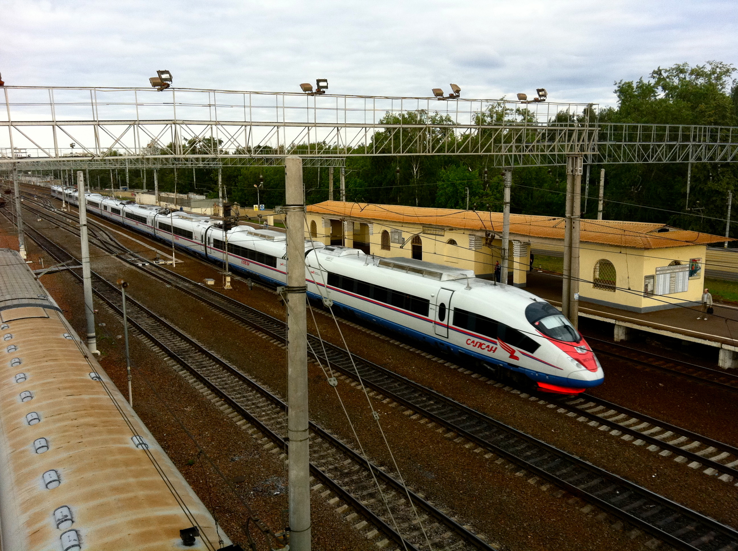 "Sapsan" passing Kuskovo station (Сапсан на станции Кусково)